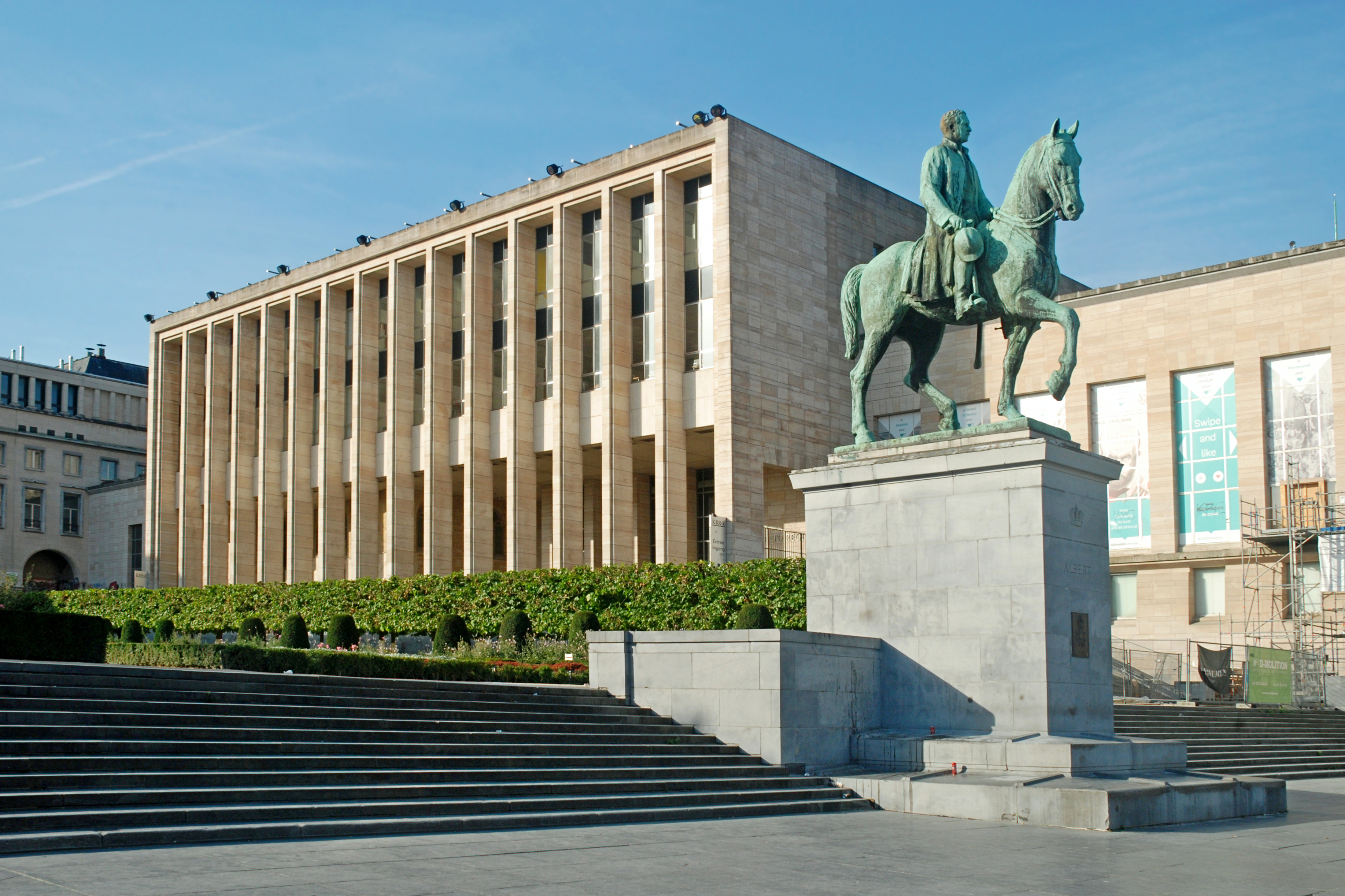 Belgique - Bruxelles - Bibliothèque Albertine (Architecture monumentale - architectes Jules Ghobert et Maurice Houyoux - 1954-1969)